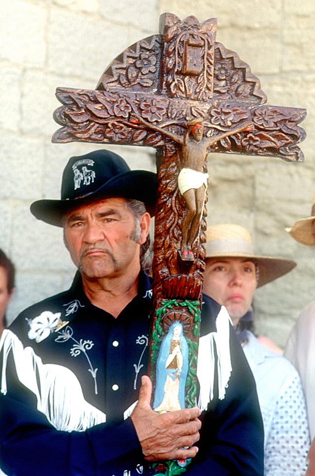 Porteur de croix au pèlerinage gitan des Saintes-Maries-de-la-Mer